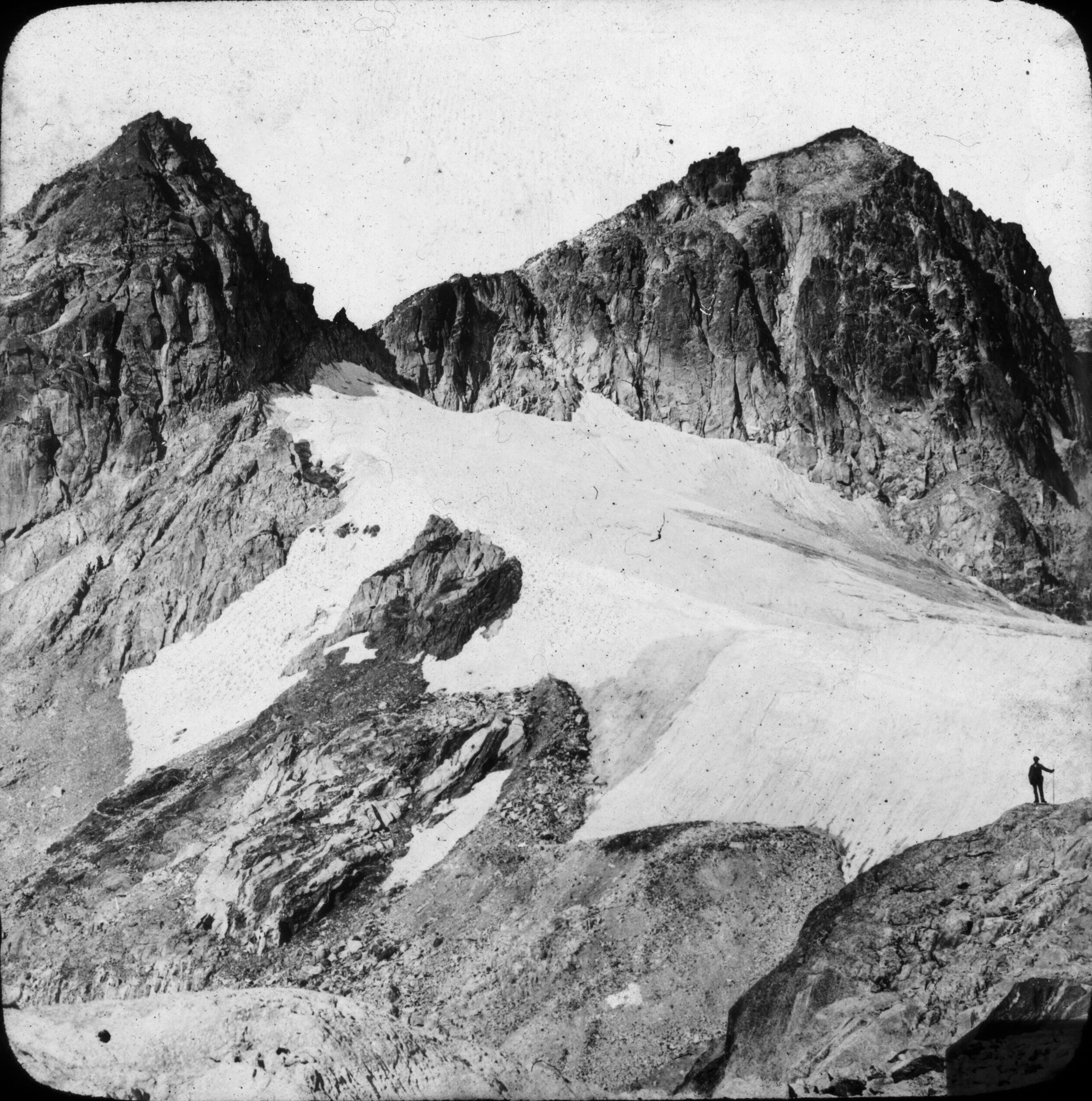 Fonds Trutat - Photographie ancienne Cote : TRU C 275 Localisation : Fonds ancien Original non communicable Titre : Grand glacier du Port d'Oô Auteur : Gourdon, Maurice Rôle de l’auteur : Photographe Lieu de création : Bagnères-de-Luchon (Haute-Garonne ; canton) Date de création : : 1859-1910 [entre] Mesures : 9 x 10 cm Mot(s)-clé(s) : -- Pic (montagne) -- Crête (montagne) -- Col (montagne) -- Glacier -- Roche -- Homme -- Alpinisme -- Oô, Port d' (France ; col) -- Oô (France ; haute-vallée) -- Bagnères-de-Luchon (Haute-Garonne ; canton) -- Luchonnais, Massif du (France) -- 19e siècle, 2e moitié -- 20e siècle, 1e quart Médium : Photographies -- Noir et blanc -- Positifs au collodion sur plaque de verre -- Paysages de montagne Bibliographie : Frappé (Jean-Bernard). - Autrefois Bagnères de Luchon. Tome II. - Anglet : Atlantica, 2001. - 297 p. ; 15 x 22 cm. - (Autrefois) cf. p. 254-261 Bibliothèque de Toulouse. Domaine public